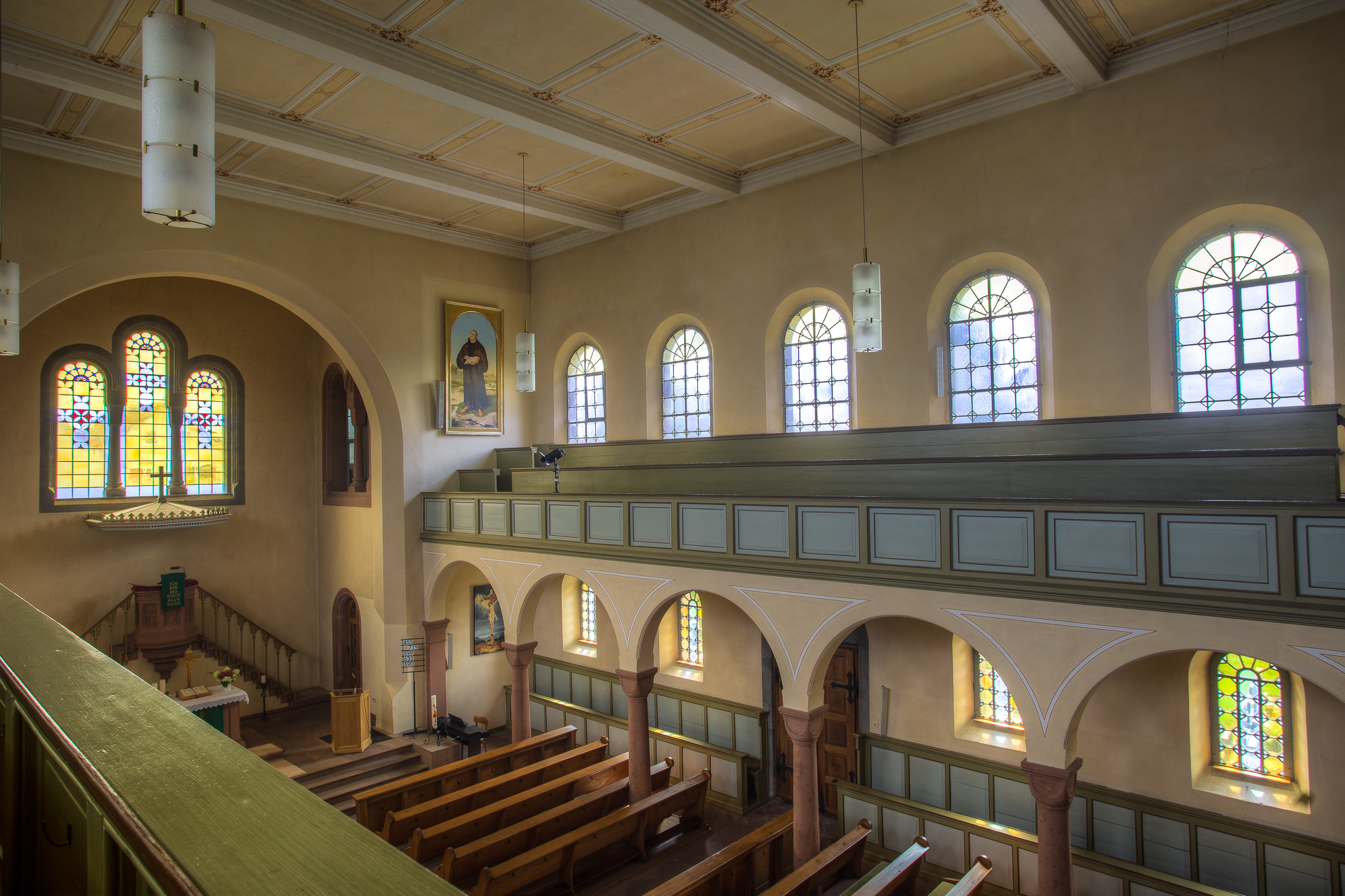 Evangelische Kirche Steinbach, Gemeinde Fernwald, Landkreis Gießen in Hessen, Deutschland